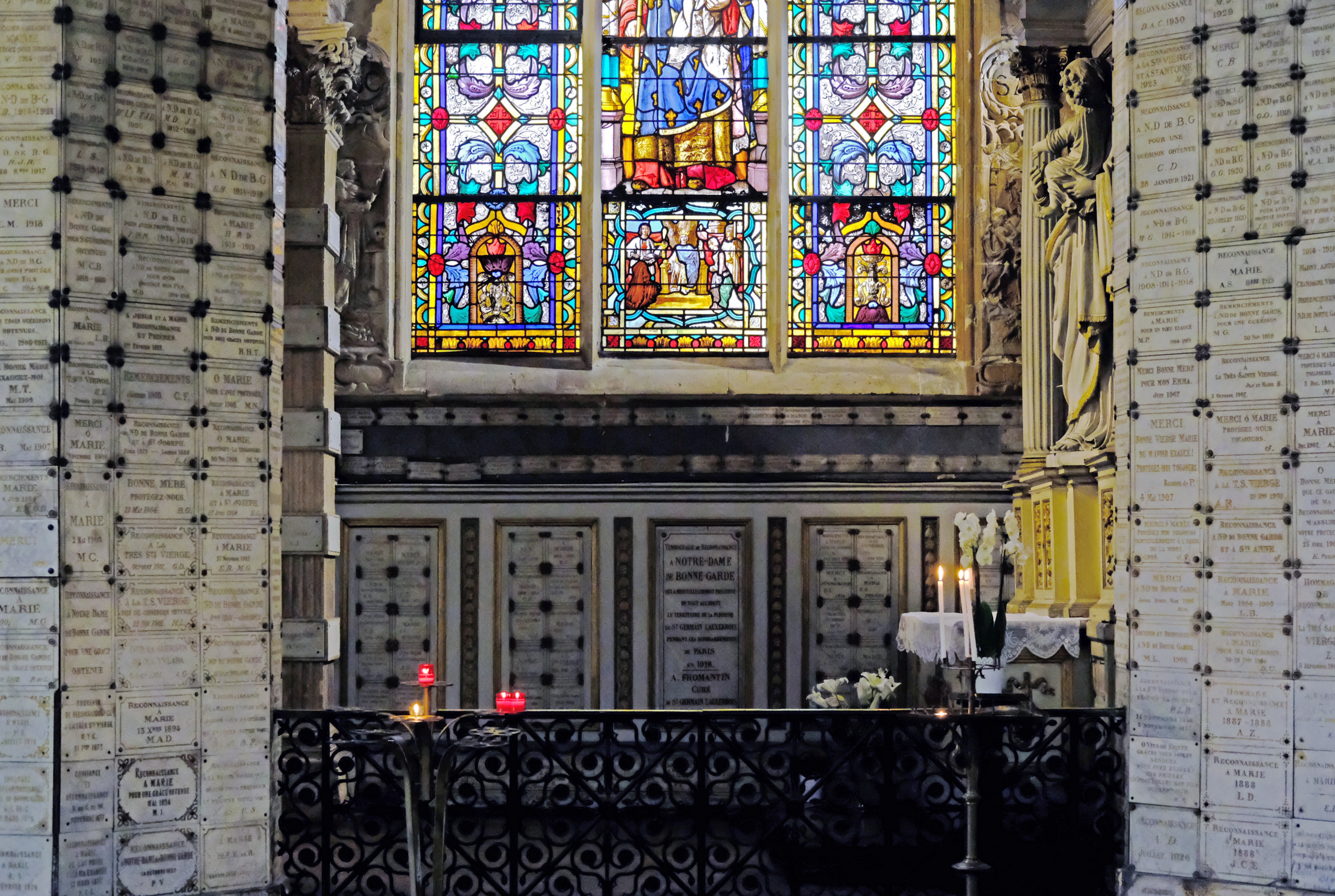 Église Saint-Germain-l'Auxerrois de Paris (chapelle Saint-Louis dite aussi Notre-Dame de la Bonne-Garde) - Paris Ier